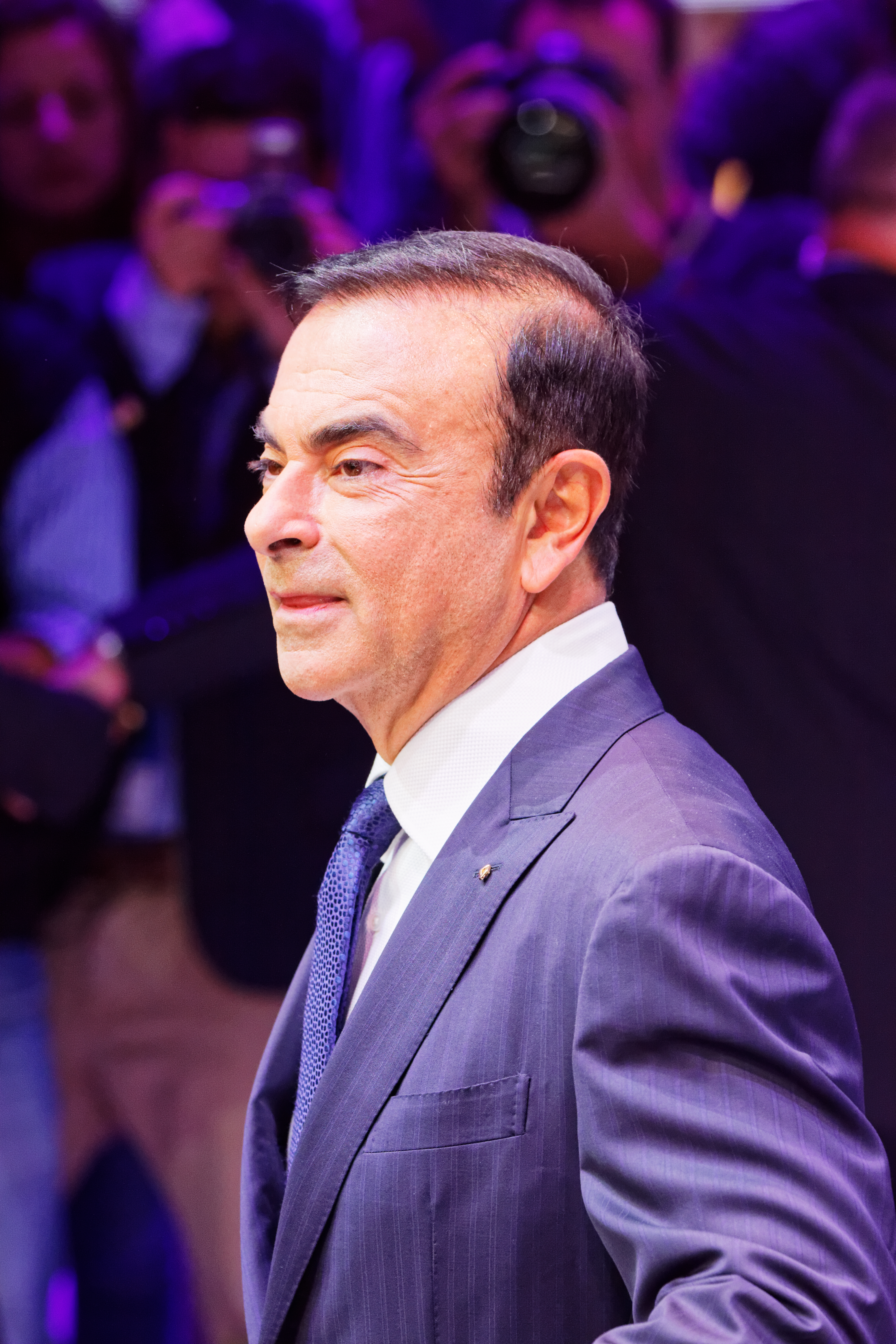 Carlos Ghosn présentant le nouvel Espace Renault lors du mondial de l'automobile de Paris 2014.